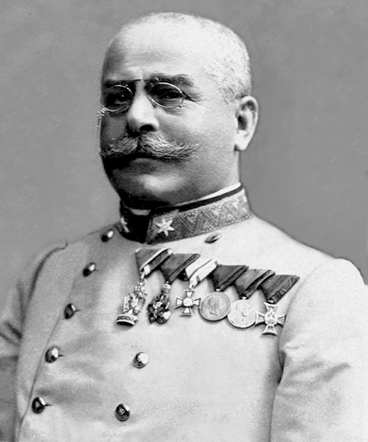 Nikolaus Cena als Generalmajor 1904